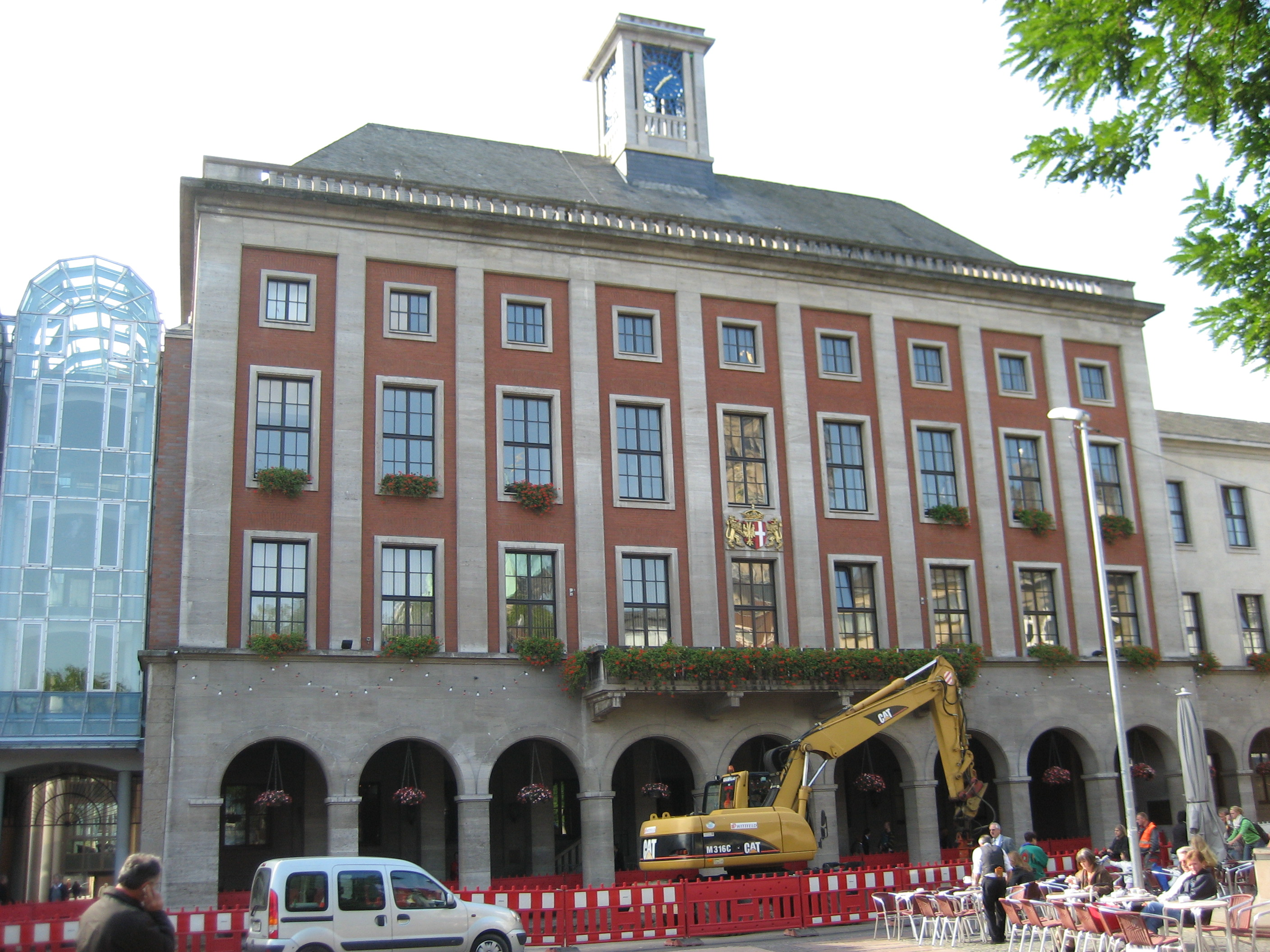 Das Rathaus in Neuss, Aufnahme von 2008